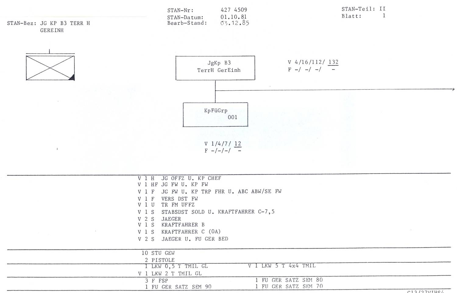 Bundeswehr: Beispiel für Stärke- und Ausrüstungsnachweis, hier Jägerkompanie B3 (Geräteeinheit) des Territorialheeres, JägerKompanie und Kompanieführungsgruppe